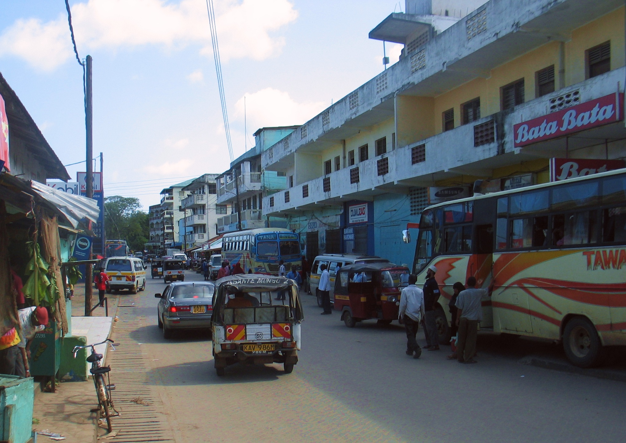 Strasse in Malindi